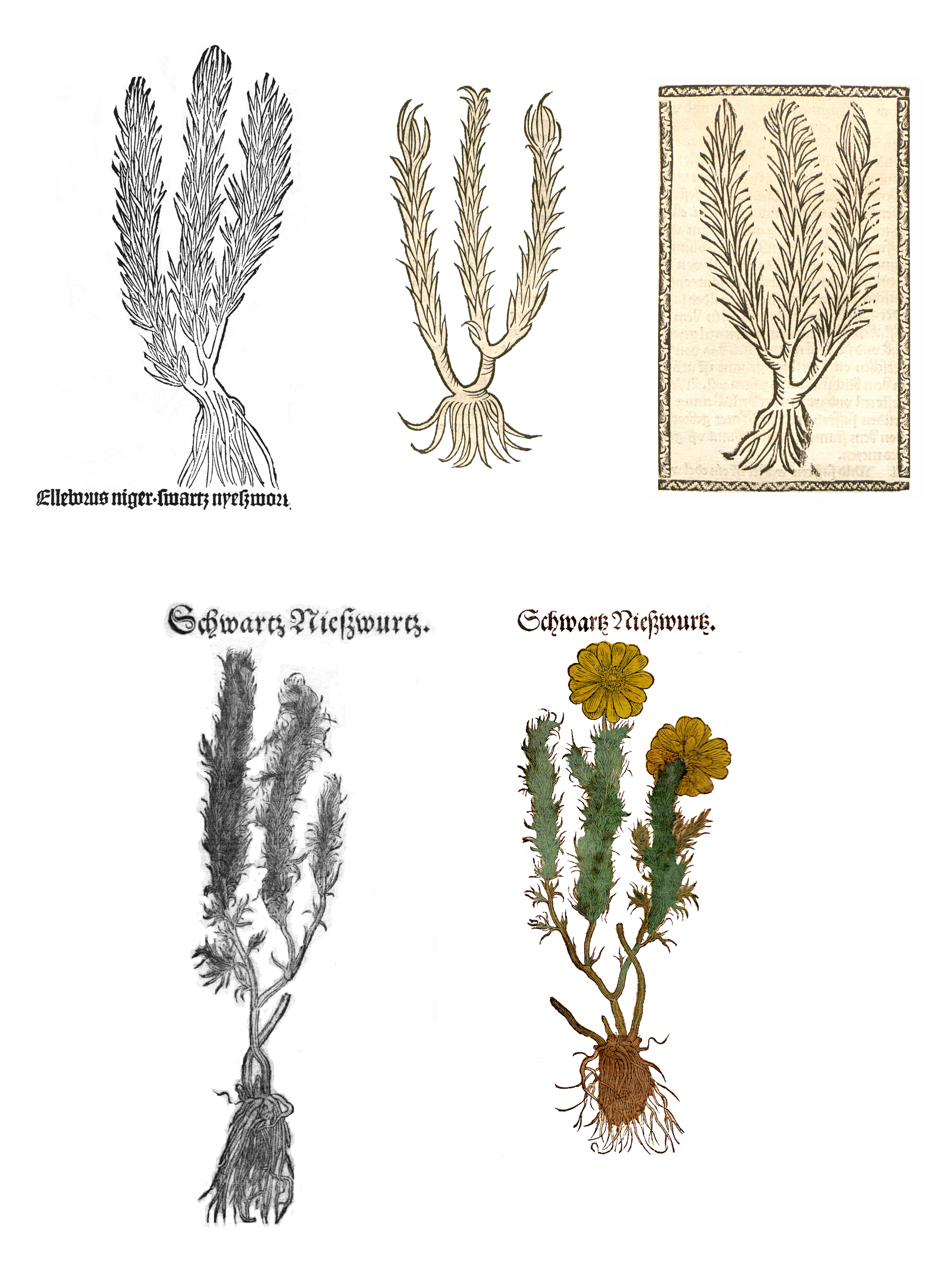 Abbildung des Adonisröscherns